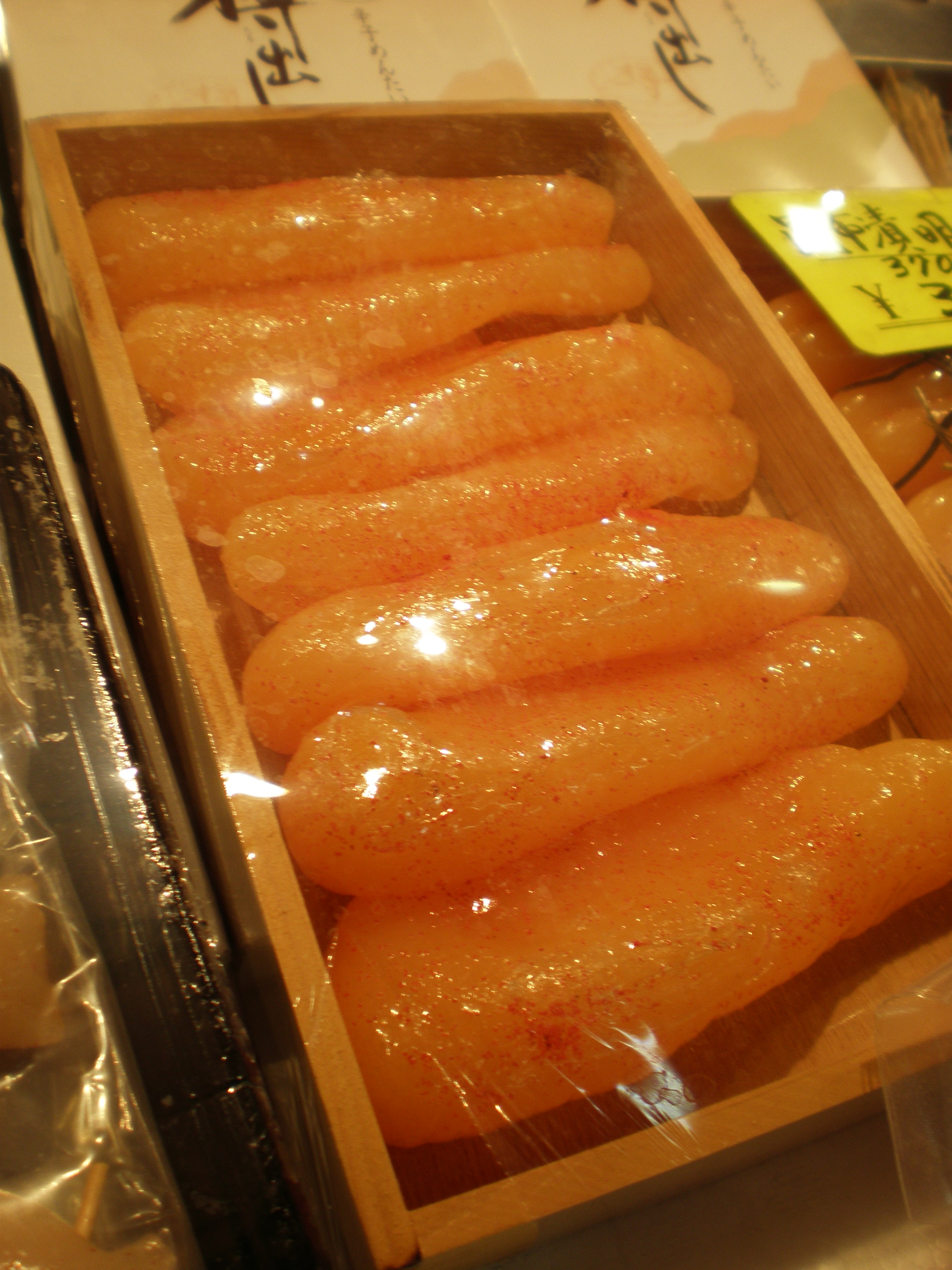 Mentaiko from a Fish Market in Fukuoka